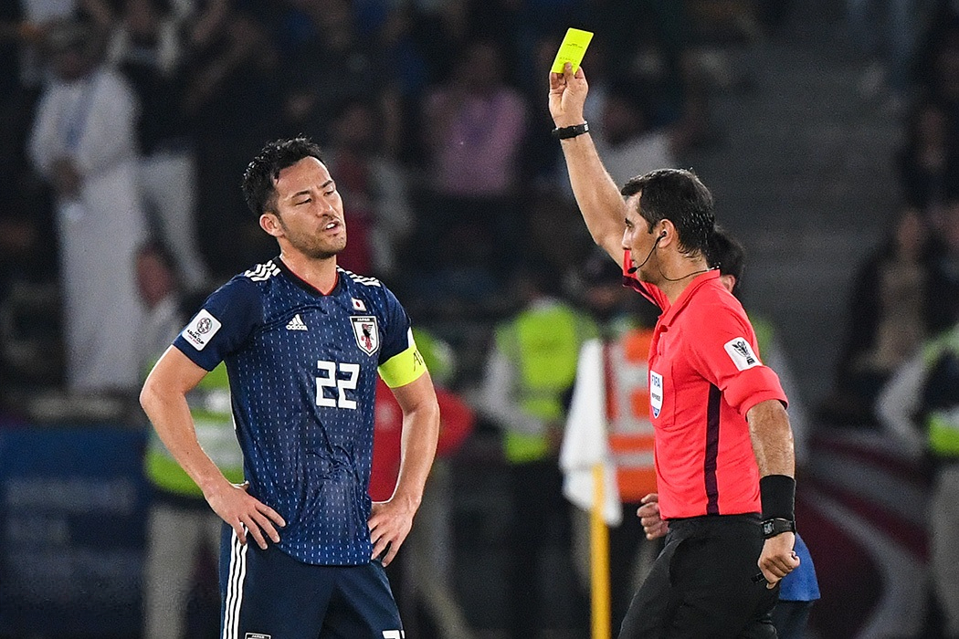 دیدار فینال جام ملت‌های 2019 آسیا بین تیم ملی فوتبال قطر و ژاپن بعدظهر جمعه 12 بهمن در ورزشگاه زاید به قضاوت روشن ایرماتوف ازبکستانی برگزار شد.المعزعلی در دقیقه 12 و عبدالعزیر حاتم 27 و اکرم عفیف در دقیقه 83 با ضربه پنالتی برای قطر گلزنی کردند.برای ژاپن مینامینو 69 موفق به گشودن دروازه قطر شدند.